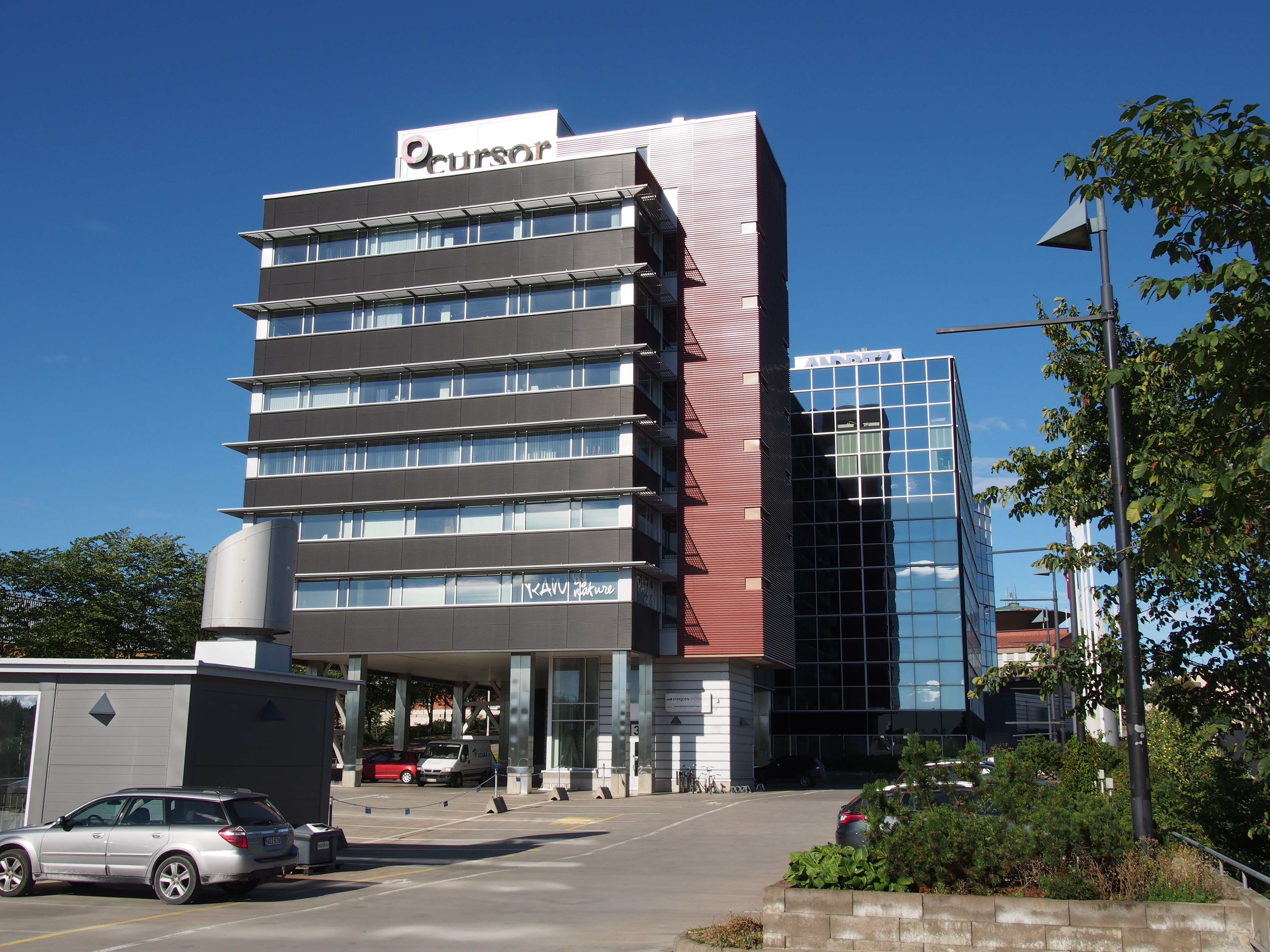 Toimistorakennus Eagle-talo Kotkassa Karhulan kaupunginosassa.